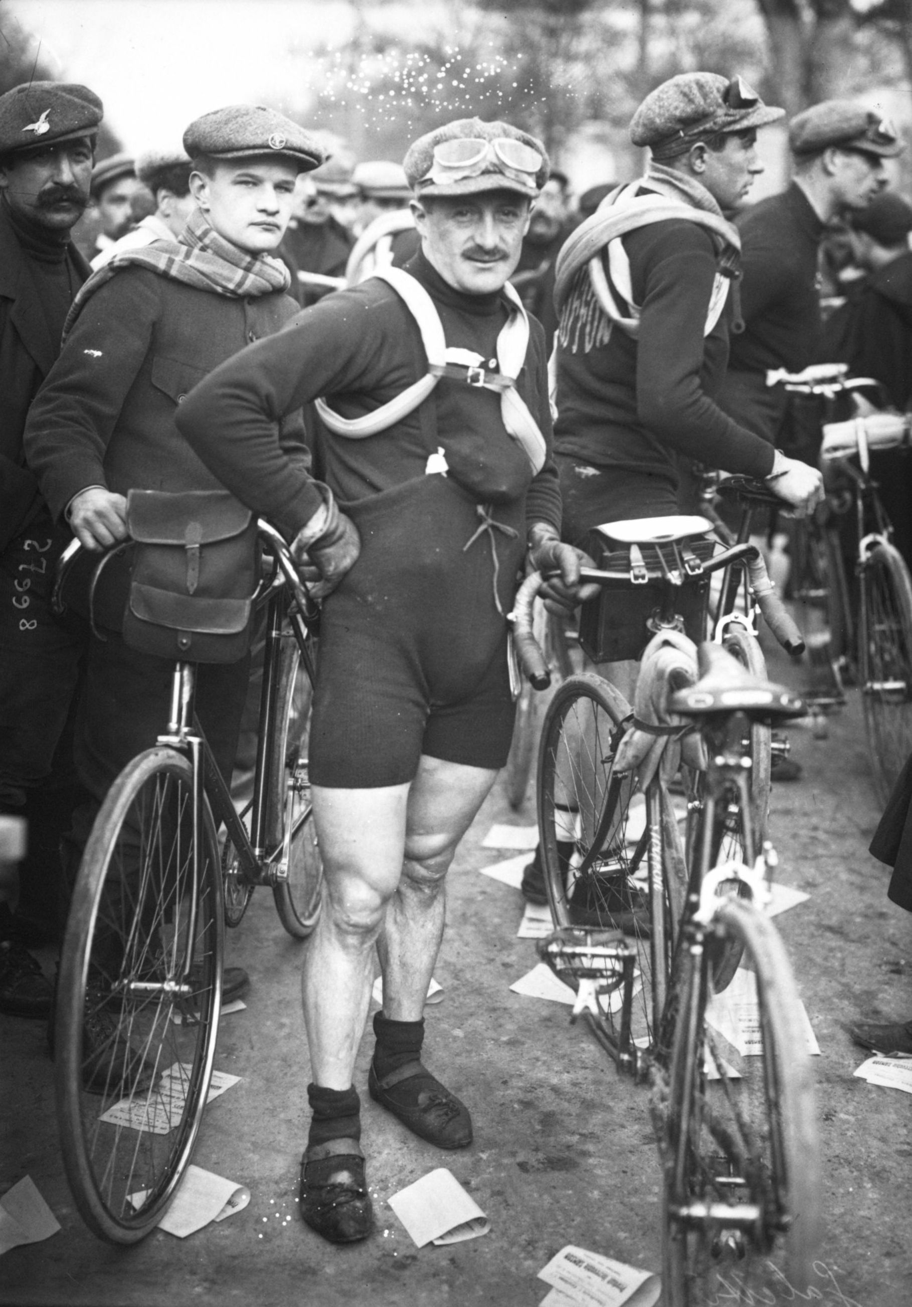 Carlo Galetti [23-03-13, portrait du coureur lors du Paris-Roubaix]